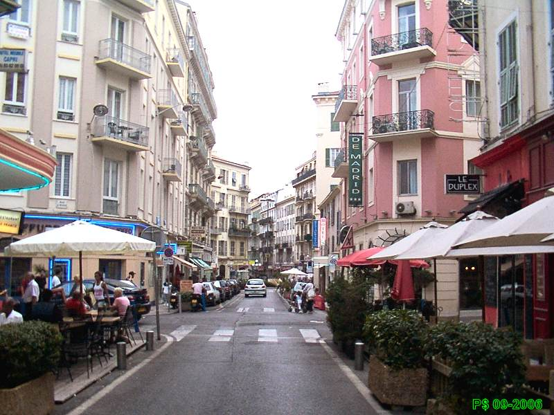 Rue d'Angleterre, la partie N reçoit de nombreux restaurants. Direction S. Quartier des Musiciens